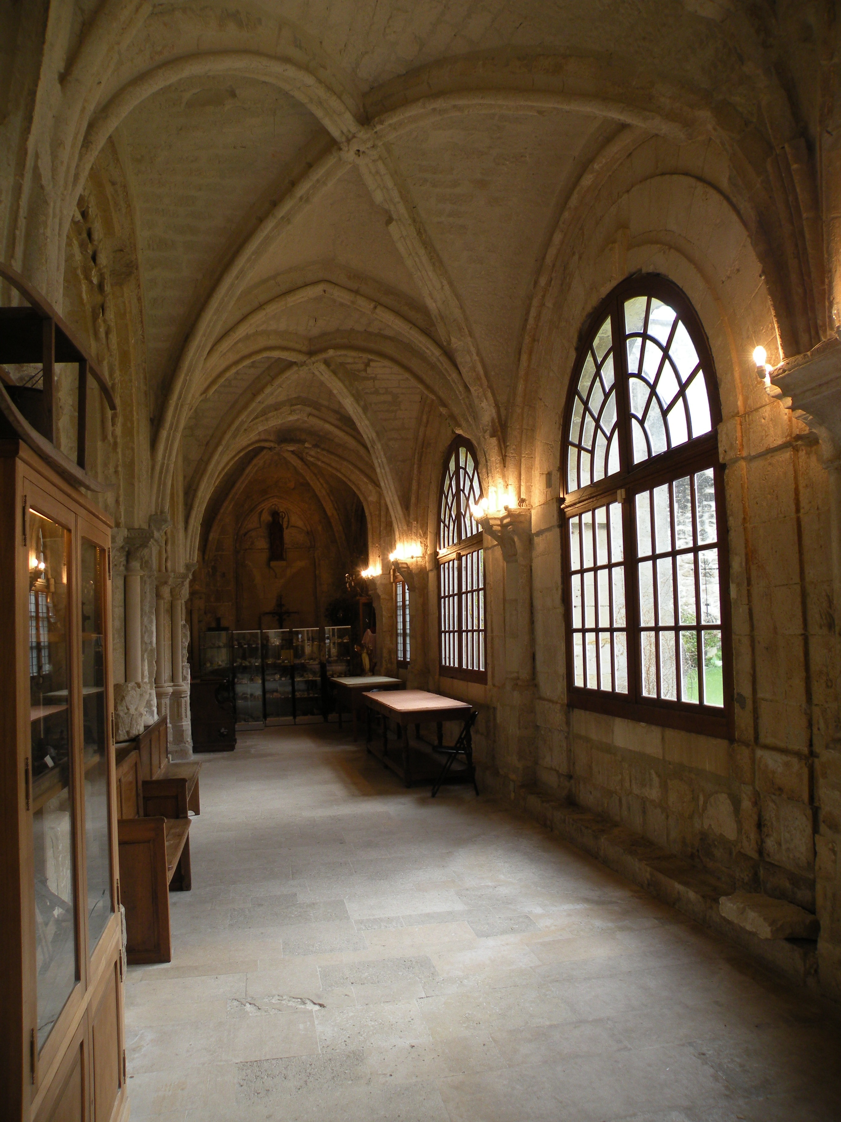 Galerie du cloître.